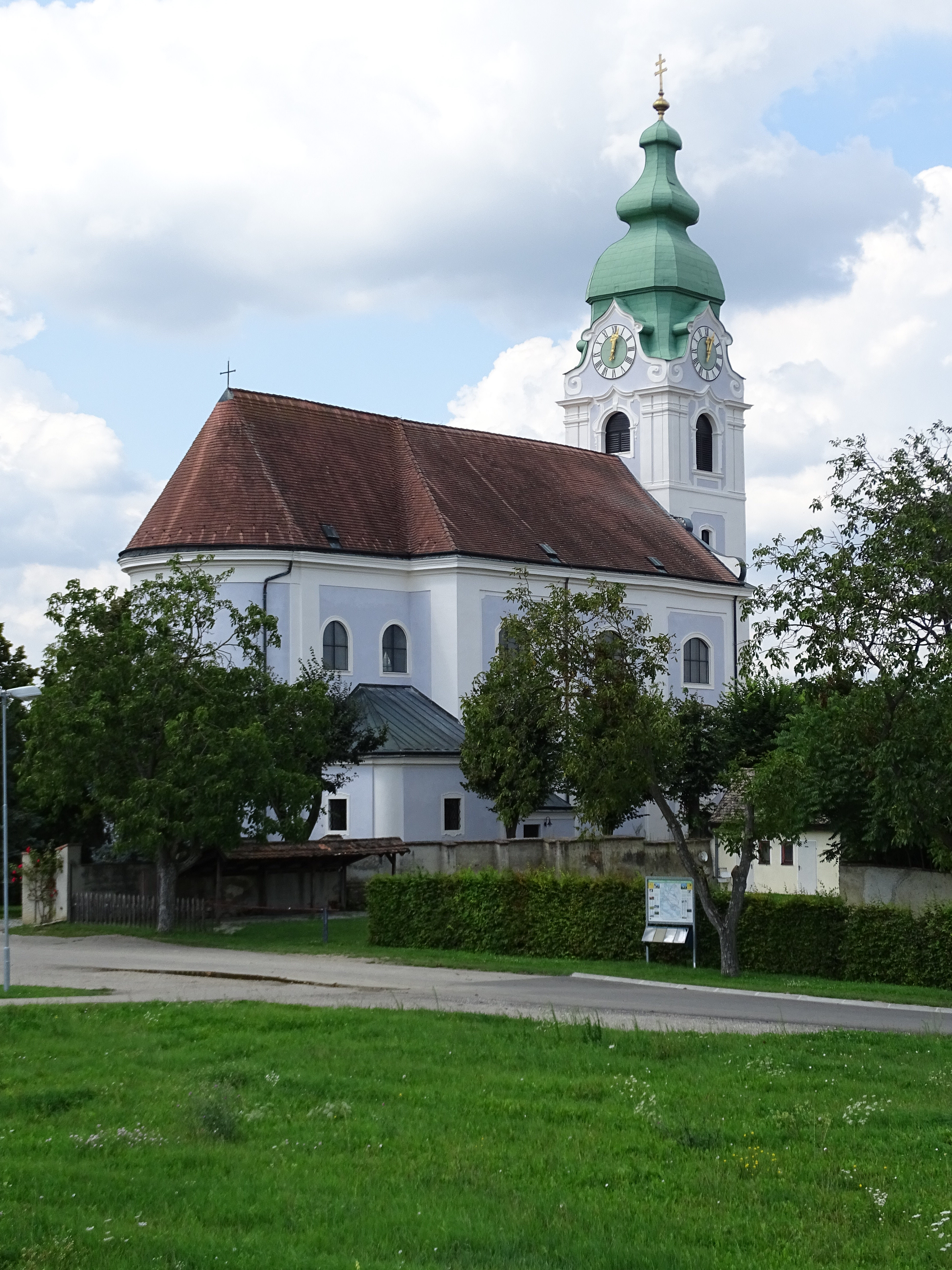 Pfarrkirche (St. Jakob) Unterretzbach